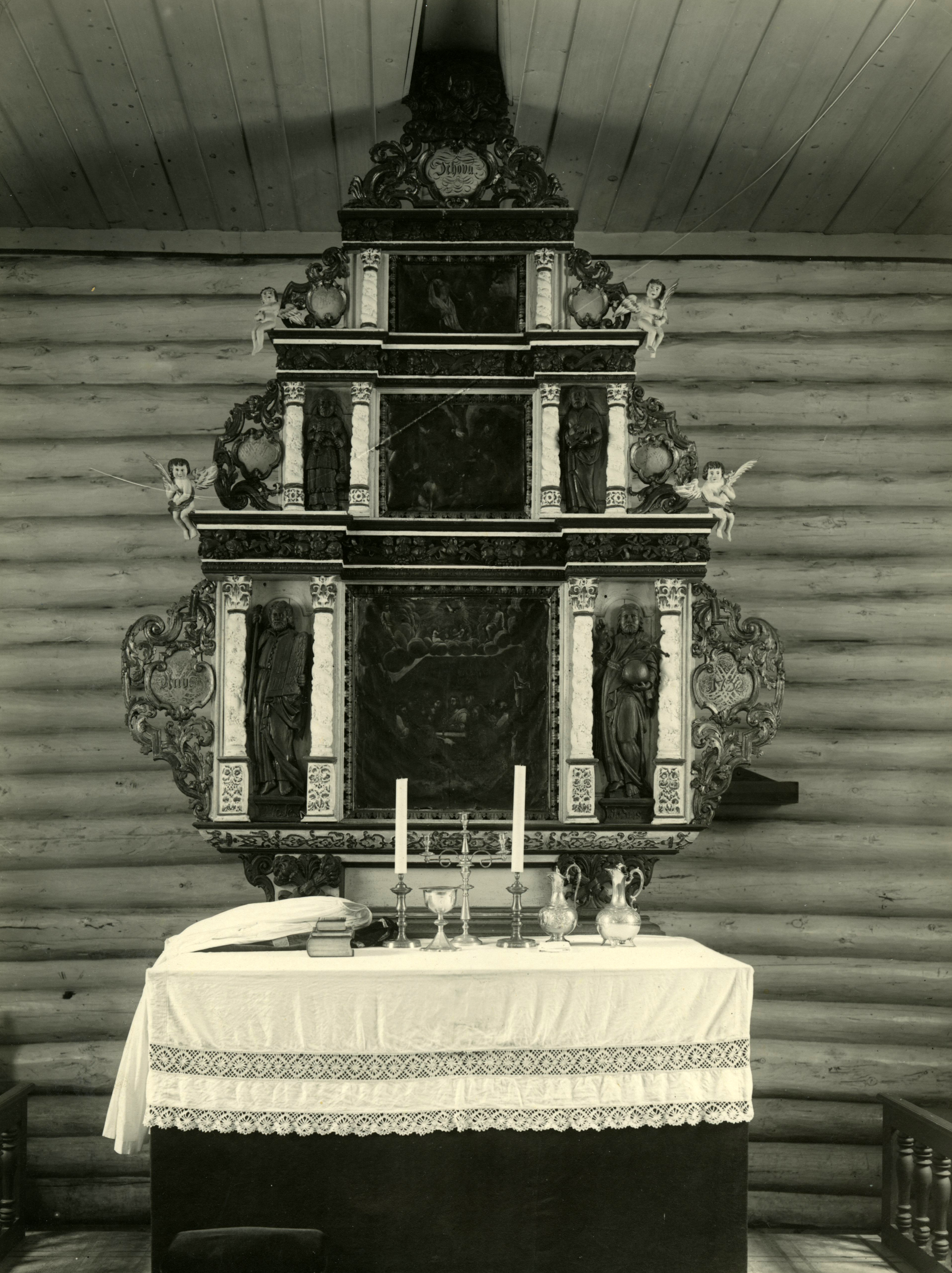 Format: Fotopositiv. Hjelp oss å identifisere tavlen! Kommentar: Dette er temmelig sikkert altertaveln i Halsa kirke på Nordmøre